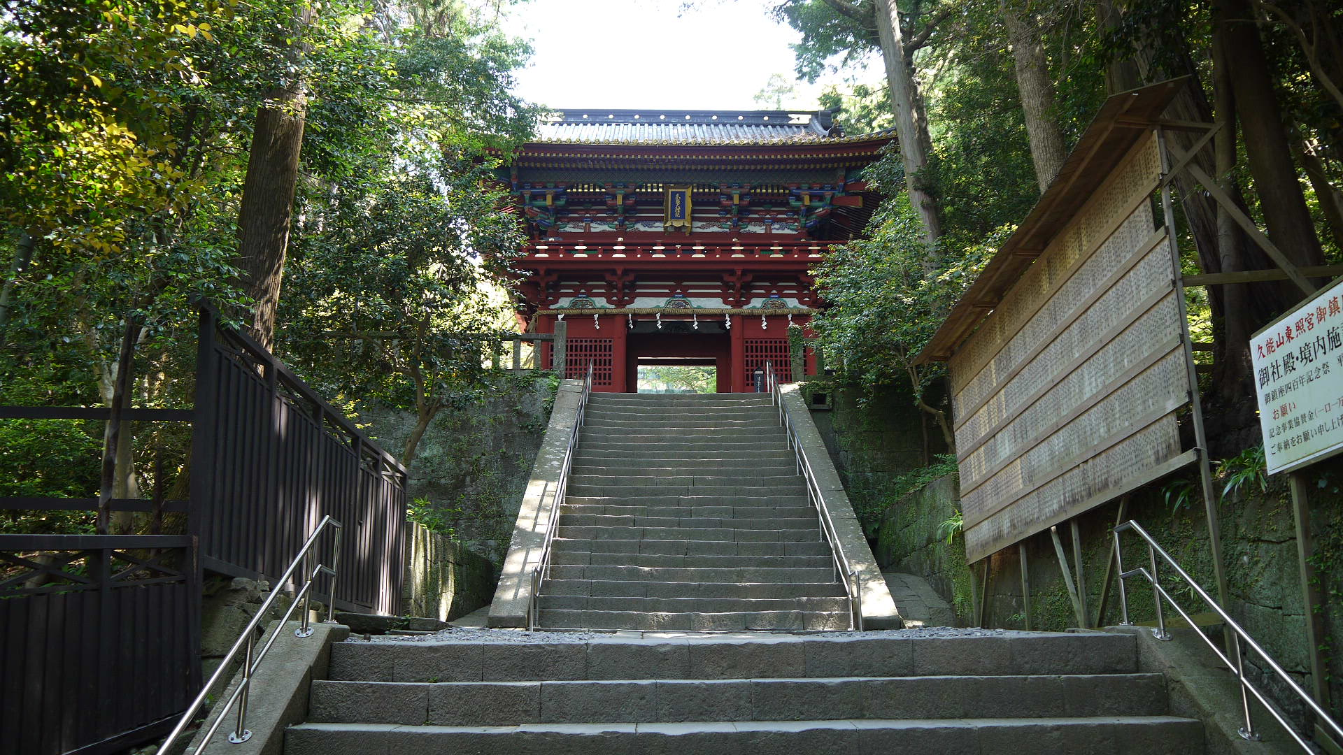 久能山東照宮1